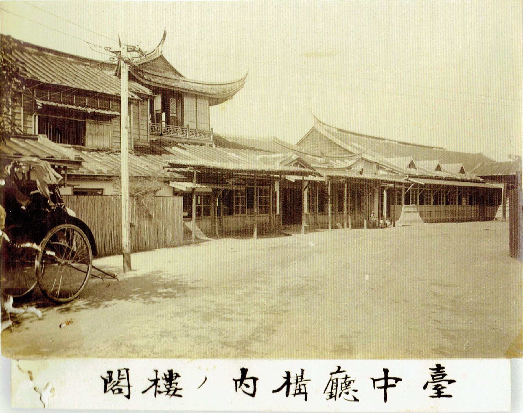 臺中廳早期辦公建築。